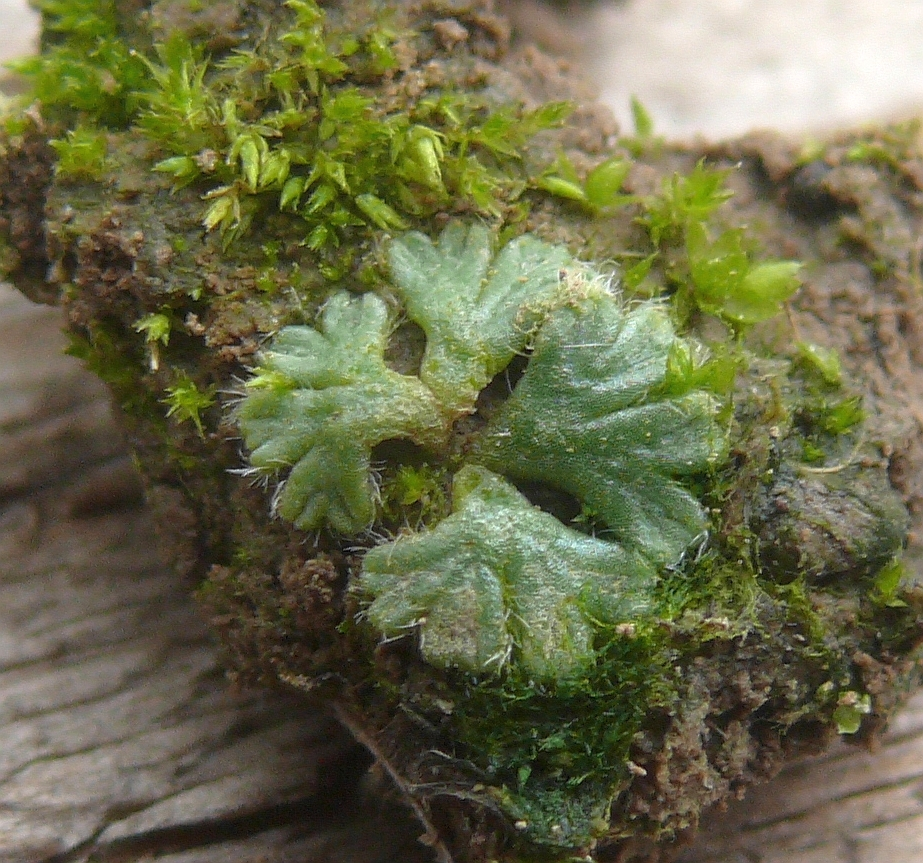 Riccia ciliata, Hohenloher Ebene, Deutschland